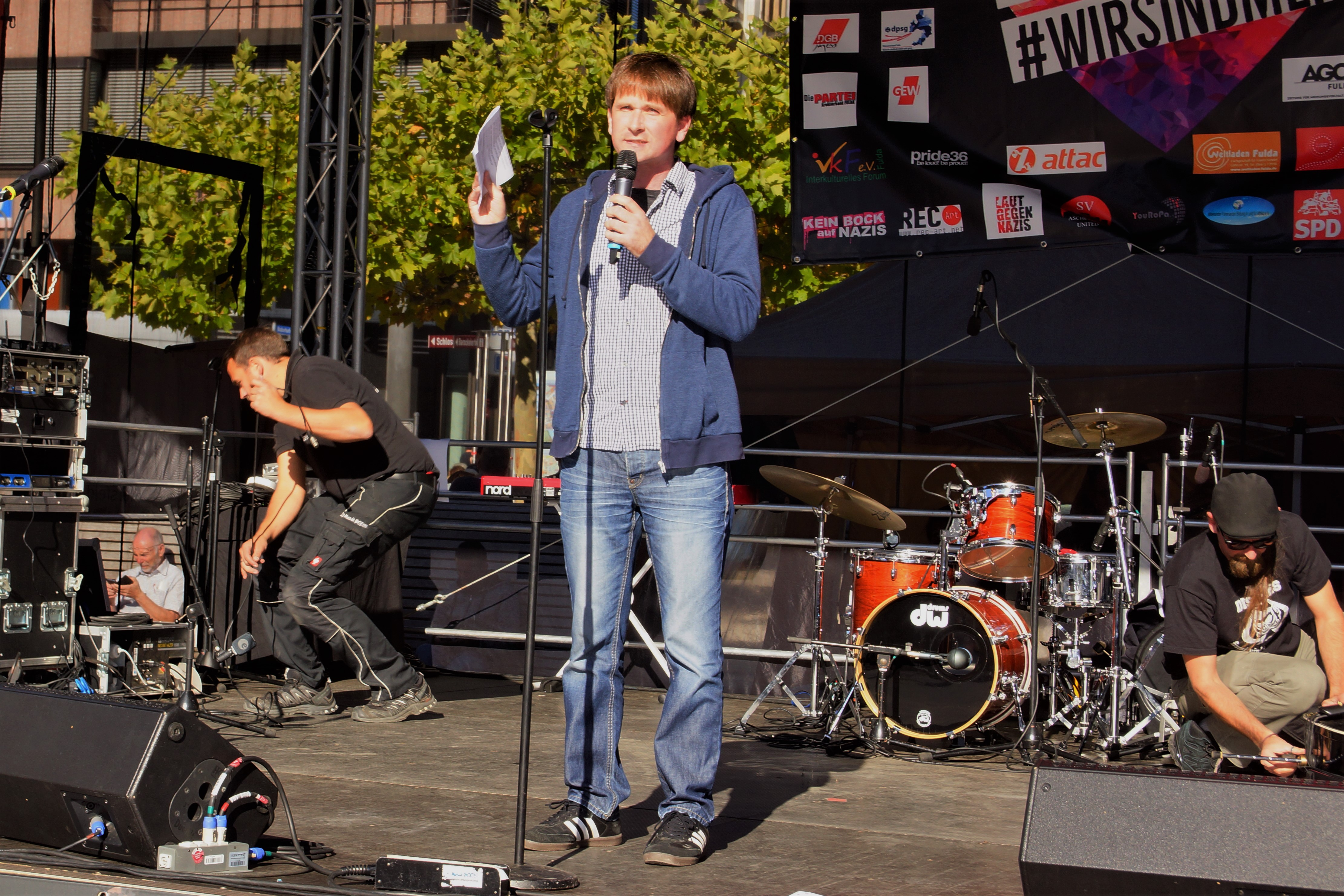 Jan Schalauske